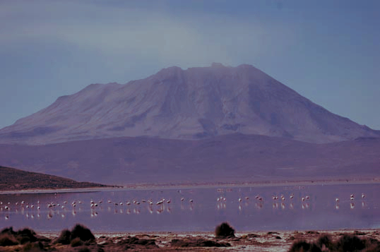 Laguna de Salinas Huito y el Volcan Ubinas